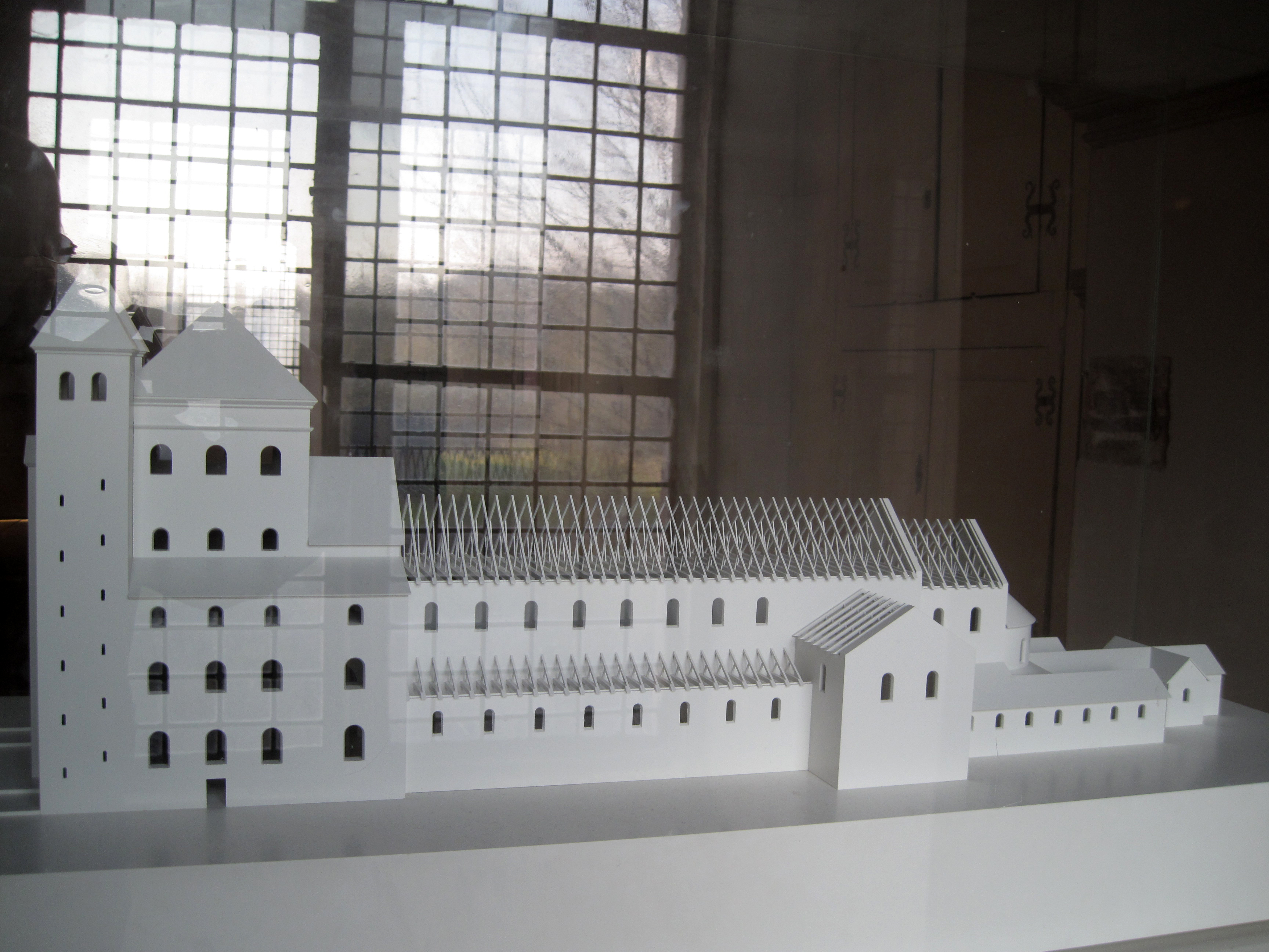 Kirche St. Stephanus und Vitus, Kaiser-Kirche, Modell der karolingischen Kirche, Corvey, Höxter, Nordrhein - Westfalen, Deutschland